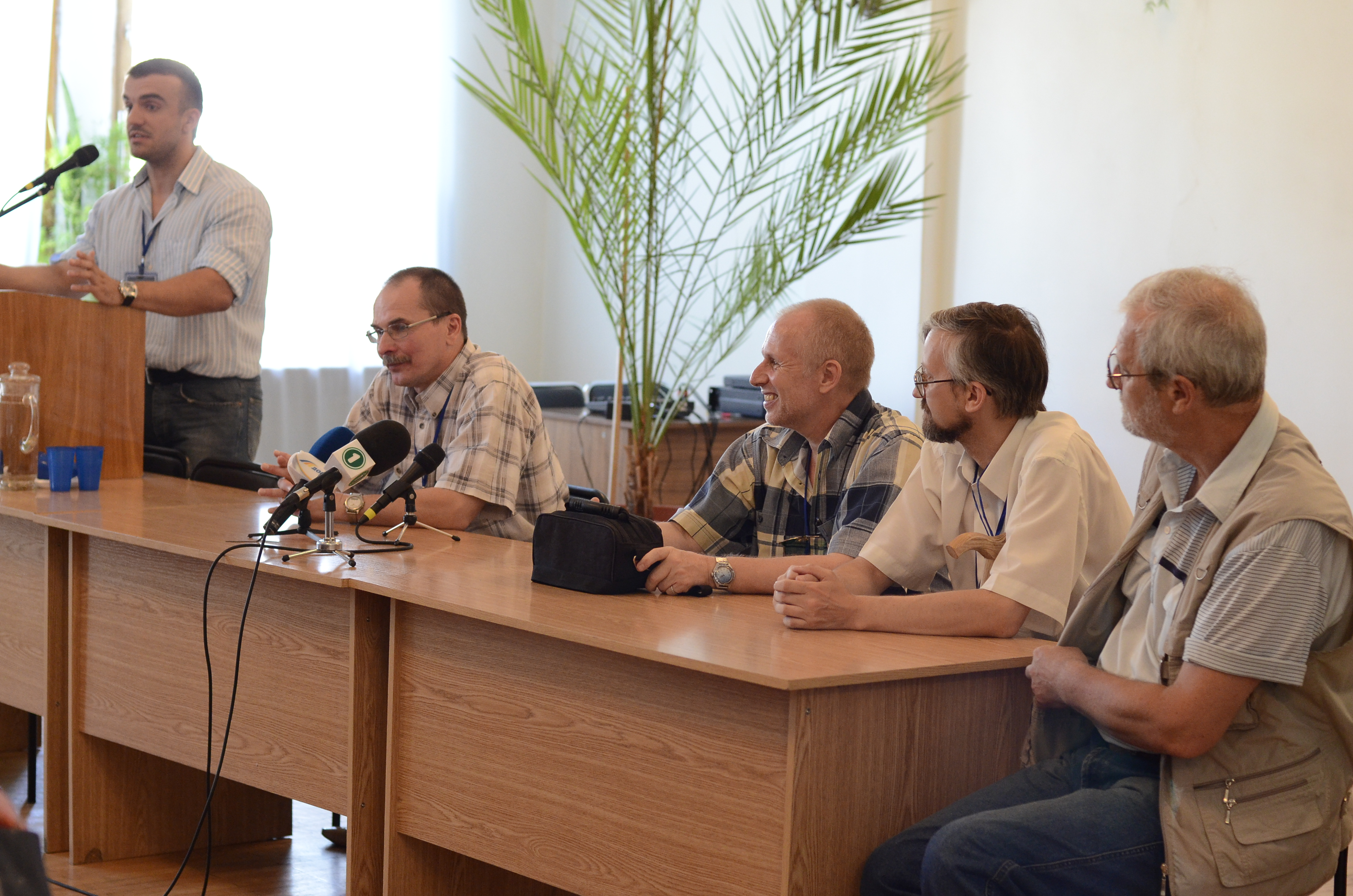 Конференция «Чумацкий Шлях» («Всеукраинский съезд Фантлаба-2011») в Донецке.